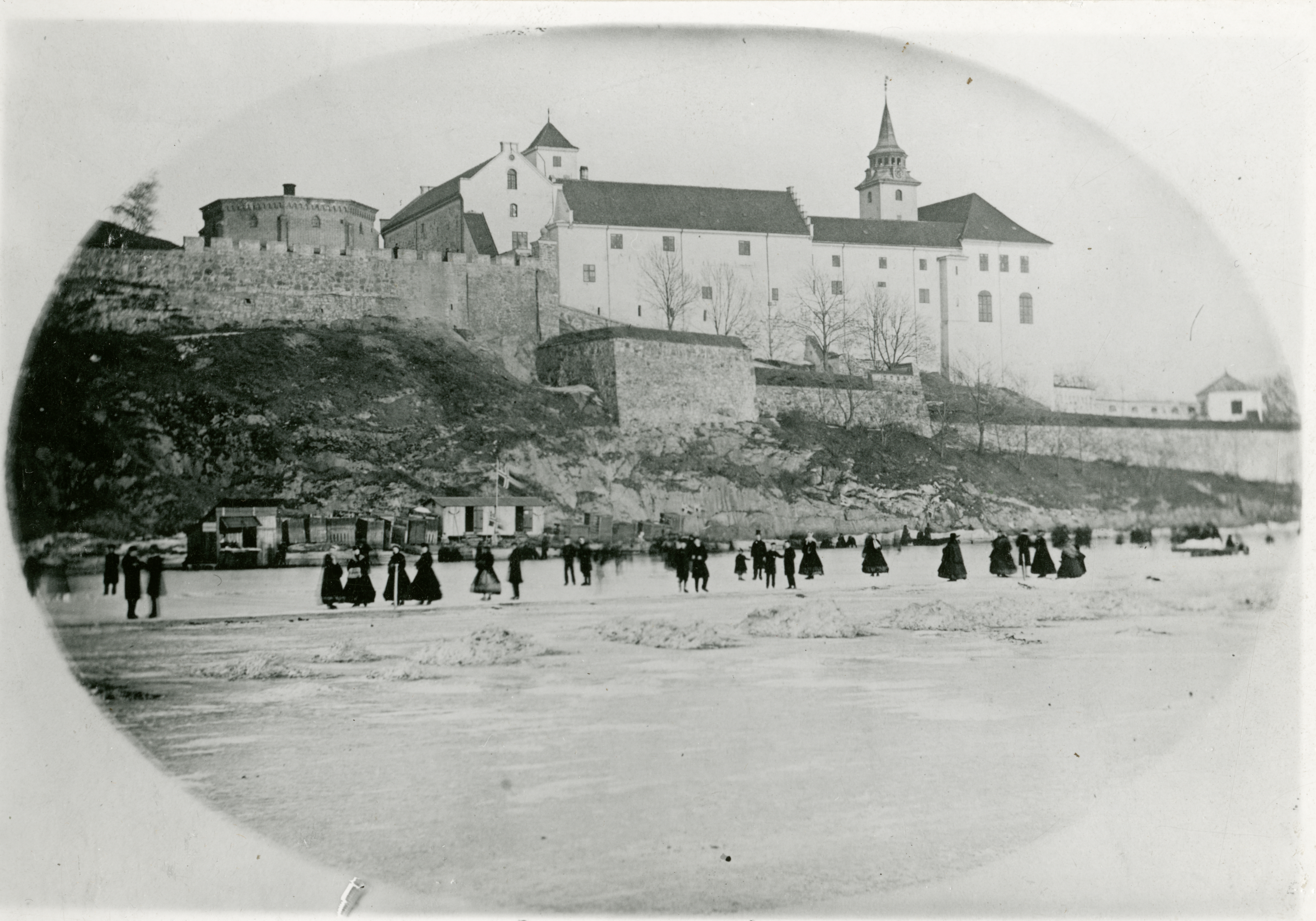 Akershus festning i Oslo, Oslo Akershus festning sett fra sjøsiden. Antagelig fra 1860-årene.